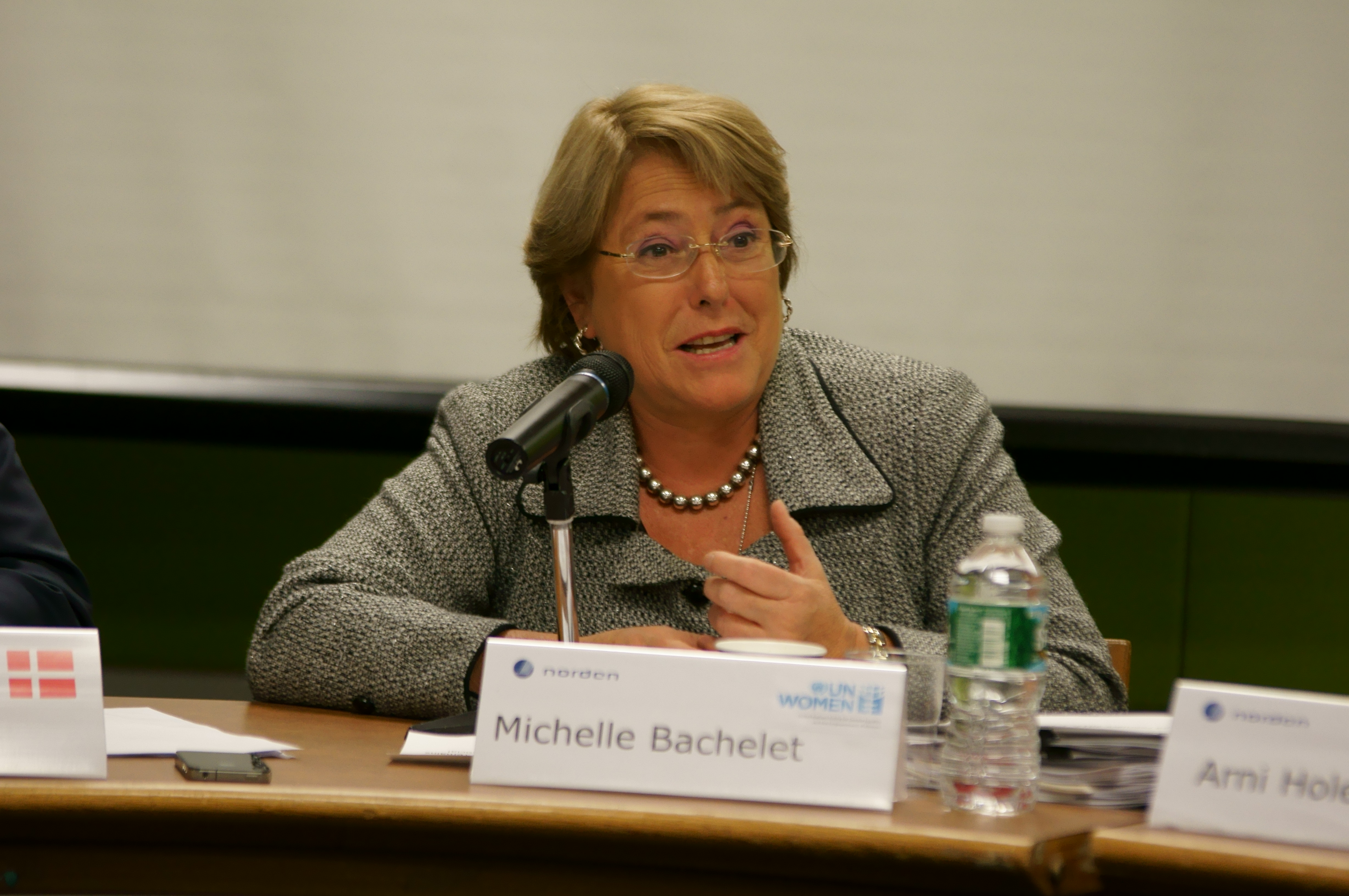 Lederen for UN Women på det nordiske side-eventet i FN under FNs kvinnekommisjons sesjon (CSW56) i New York. Februar 2012.